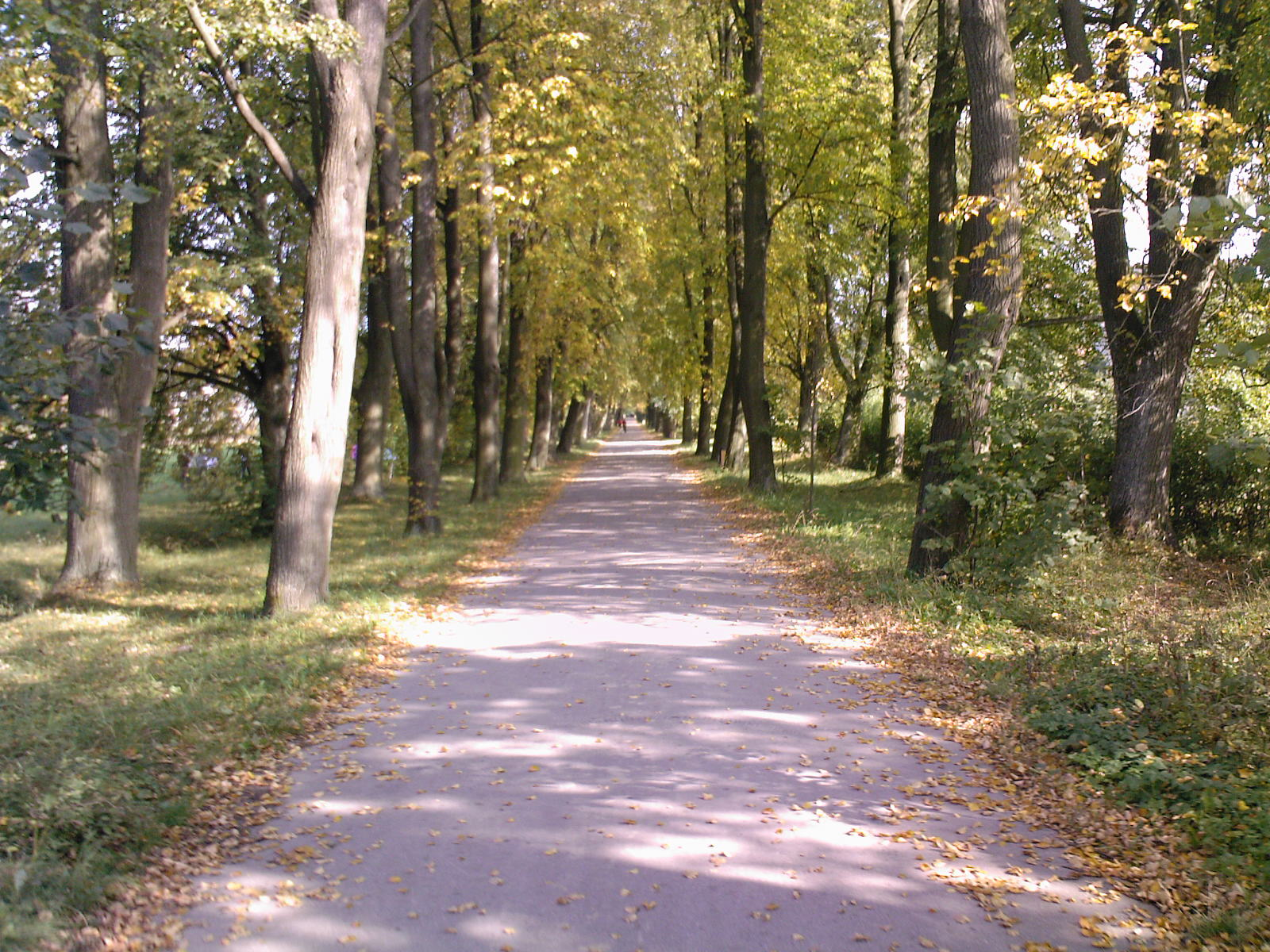 Aleja lipowa prowadząca do muzeum Henryka Sienkiewicza w Oblęgorku